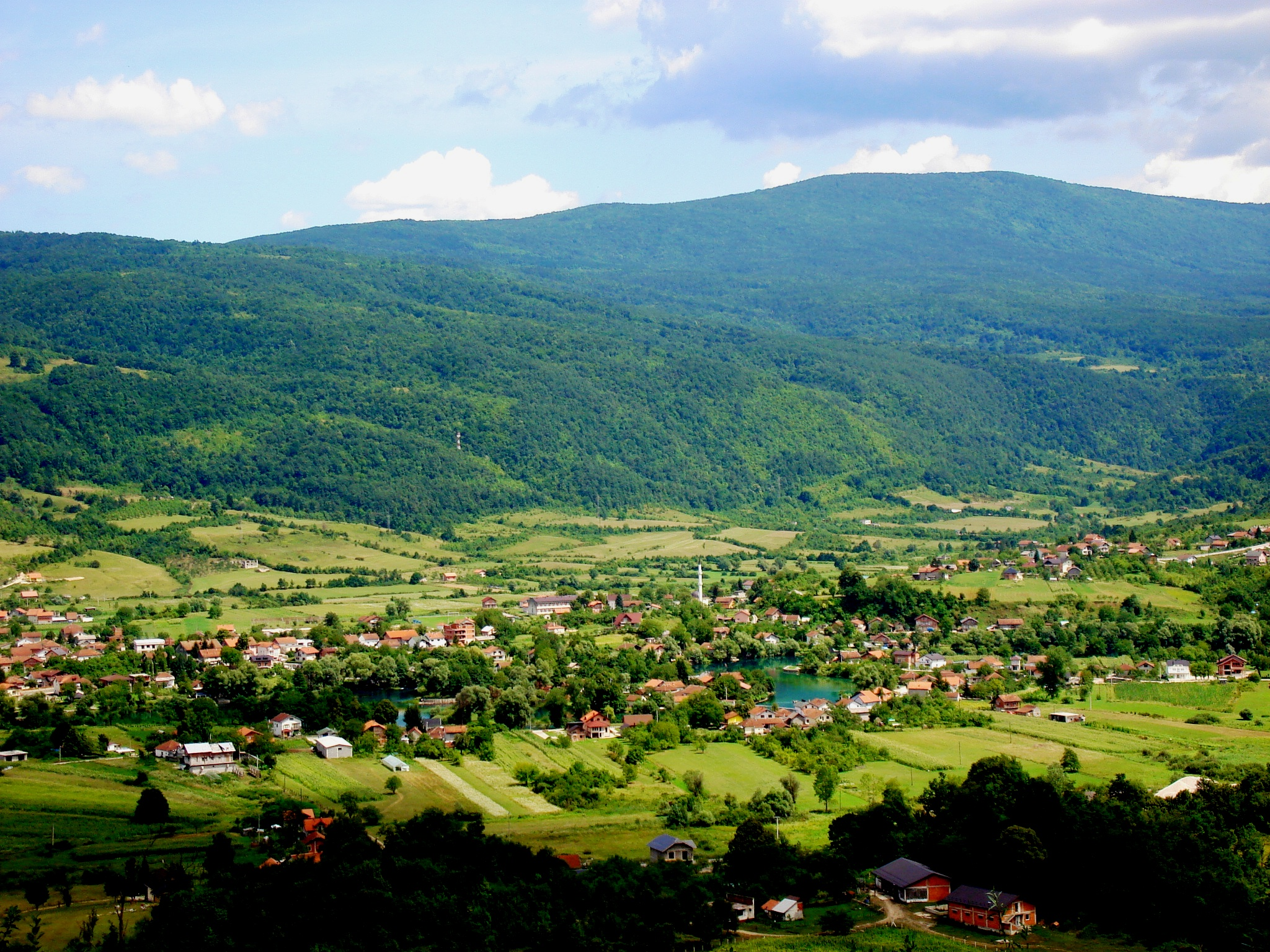 Ripač